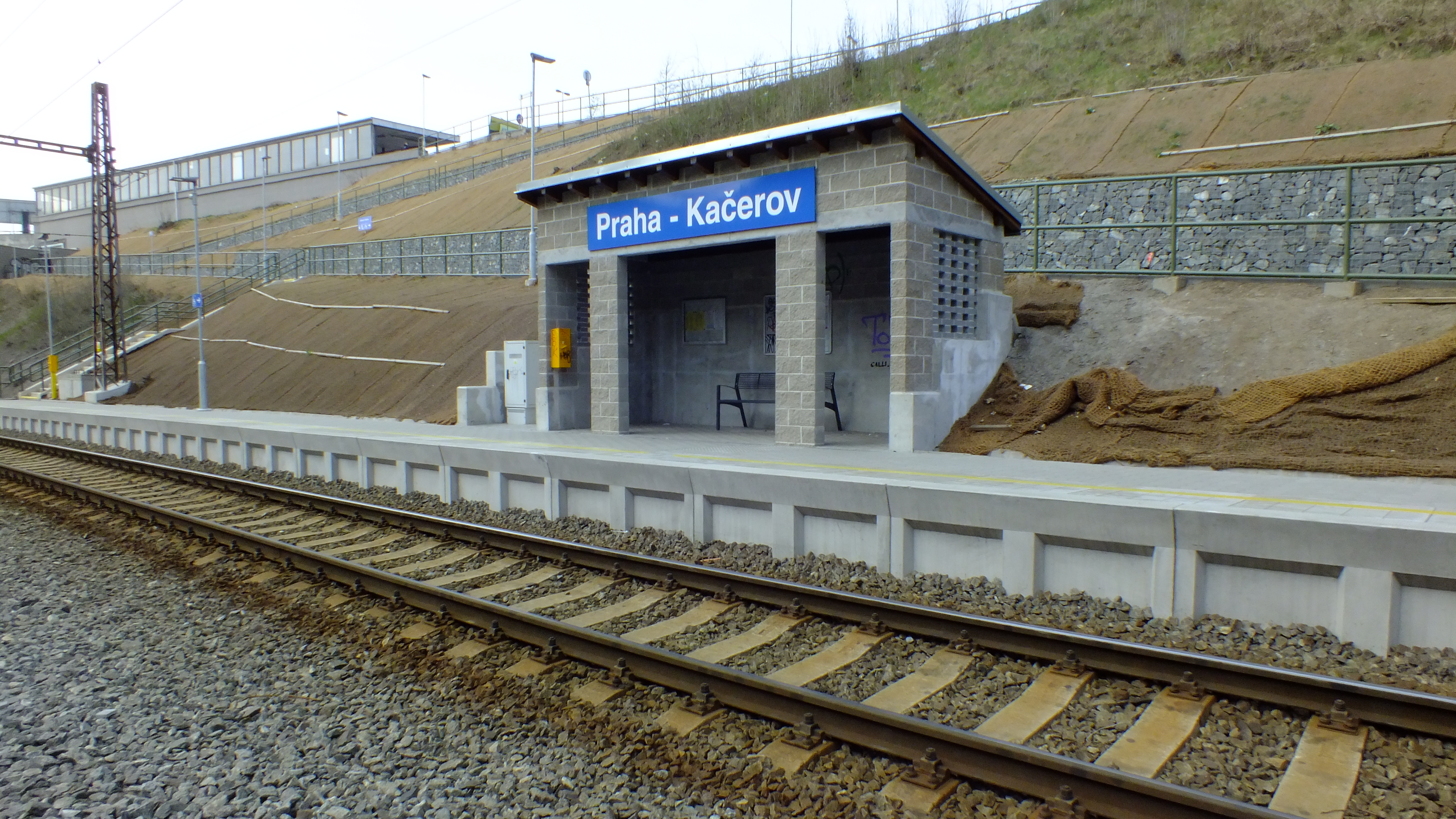 Železniční zastávka Praha-Kačerov